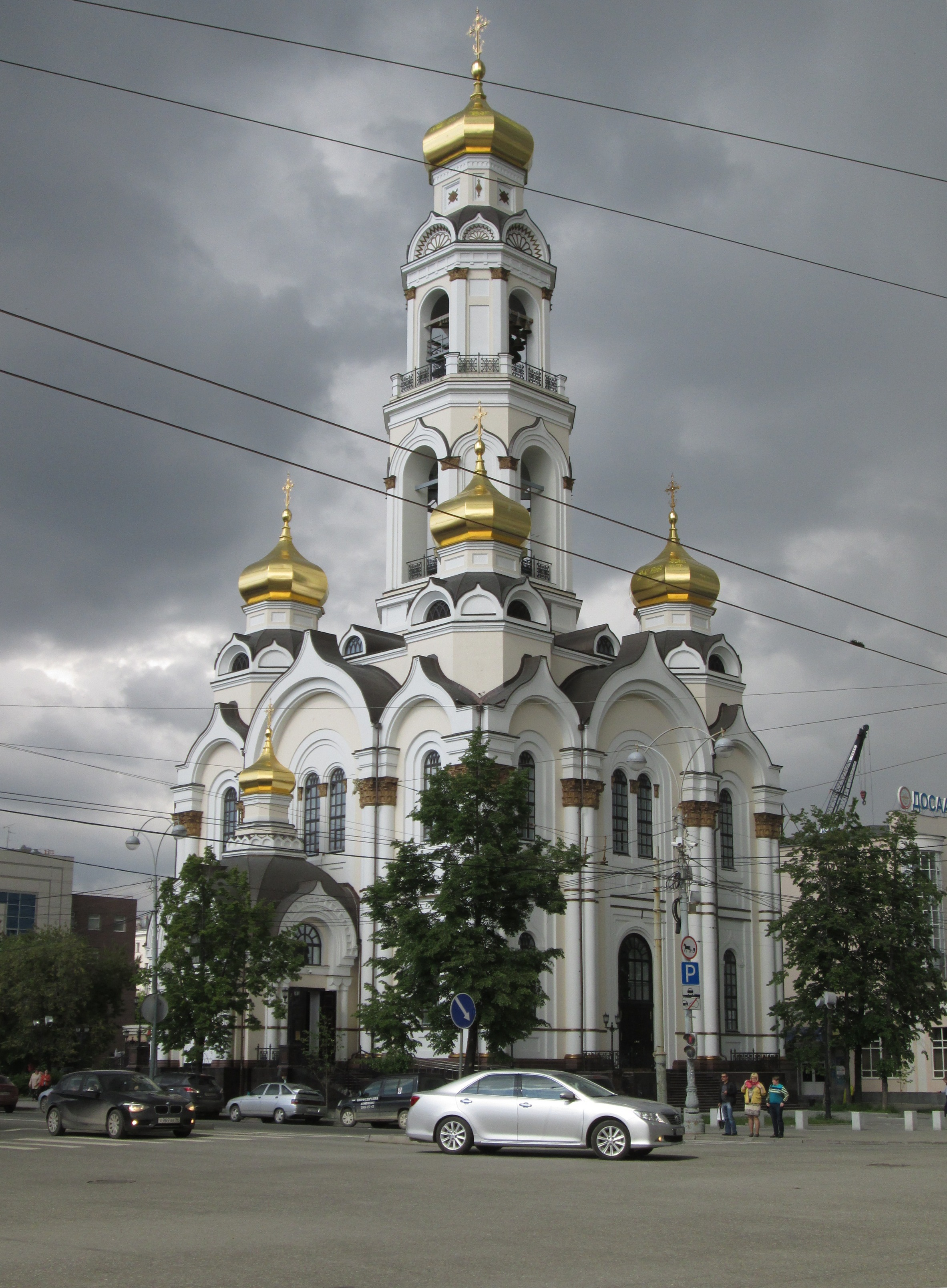 Вид с перекрёстка улиц Малышева - 8-е марта.